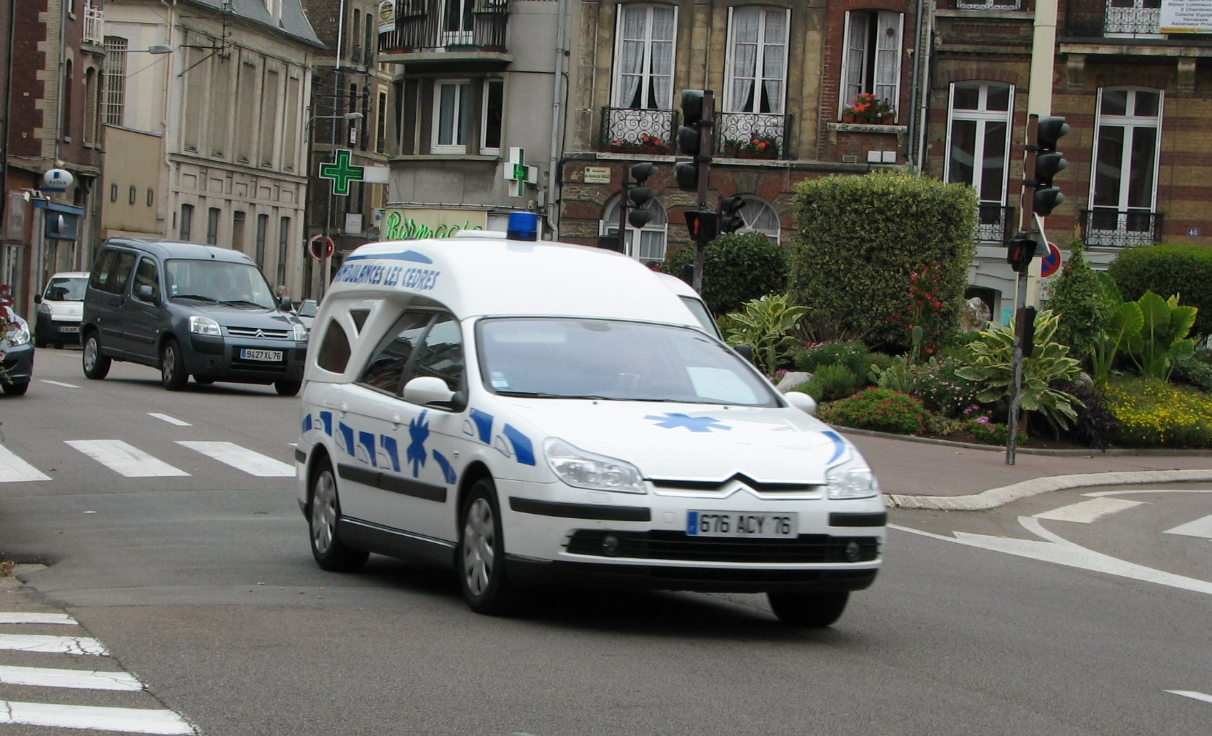 Citroën C5 ambulance